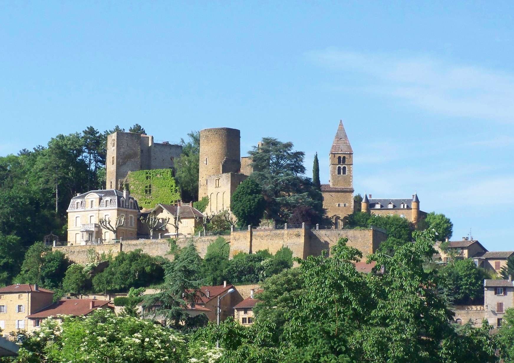 Le Village de Châtillon d'Azergues (Rhône, France)